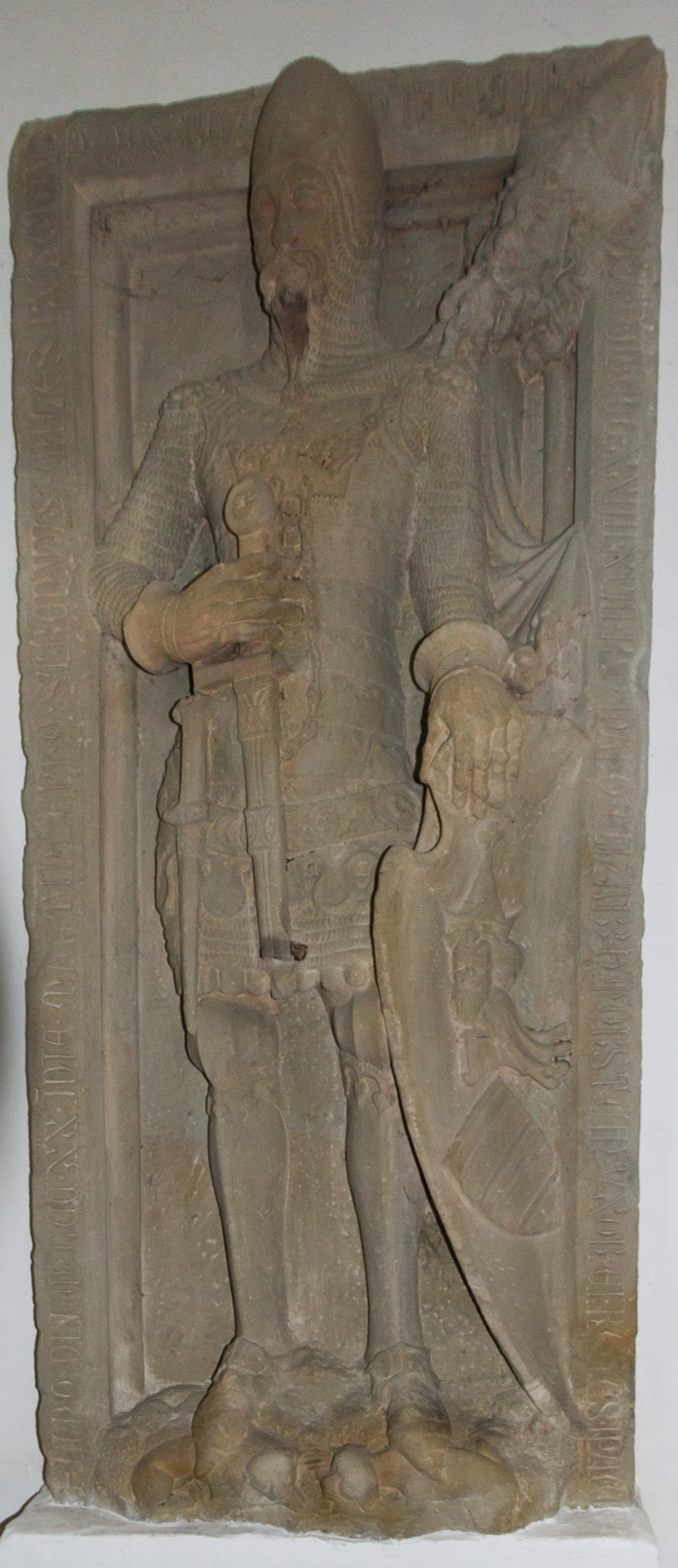 Epitaph für Rezzo von Bächlingen, datiert 1320, in der Kirche Bächlingen